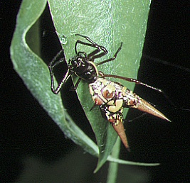 Micrathena sexspinosa from Costa Rica.